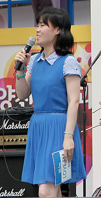 틴탑과 박영진, 박지선